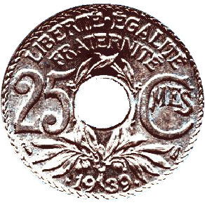 Pièce de 25 centimes Lindauer de 1939 en maillechort